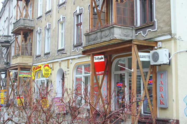 Zigaretten Str. in Słubice